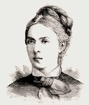 Evgenija Nikolaevna Figner